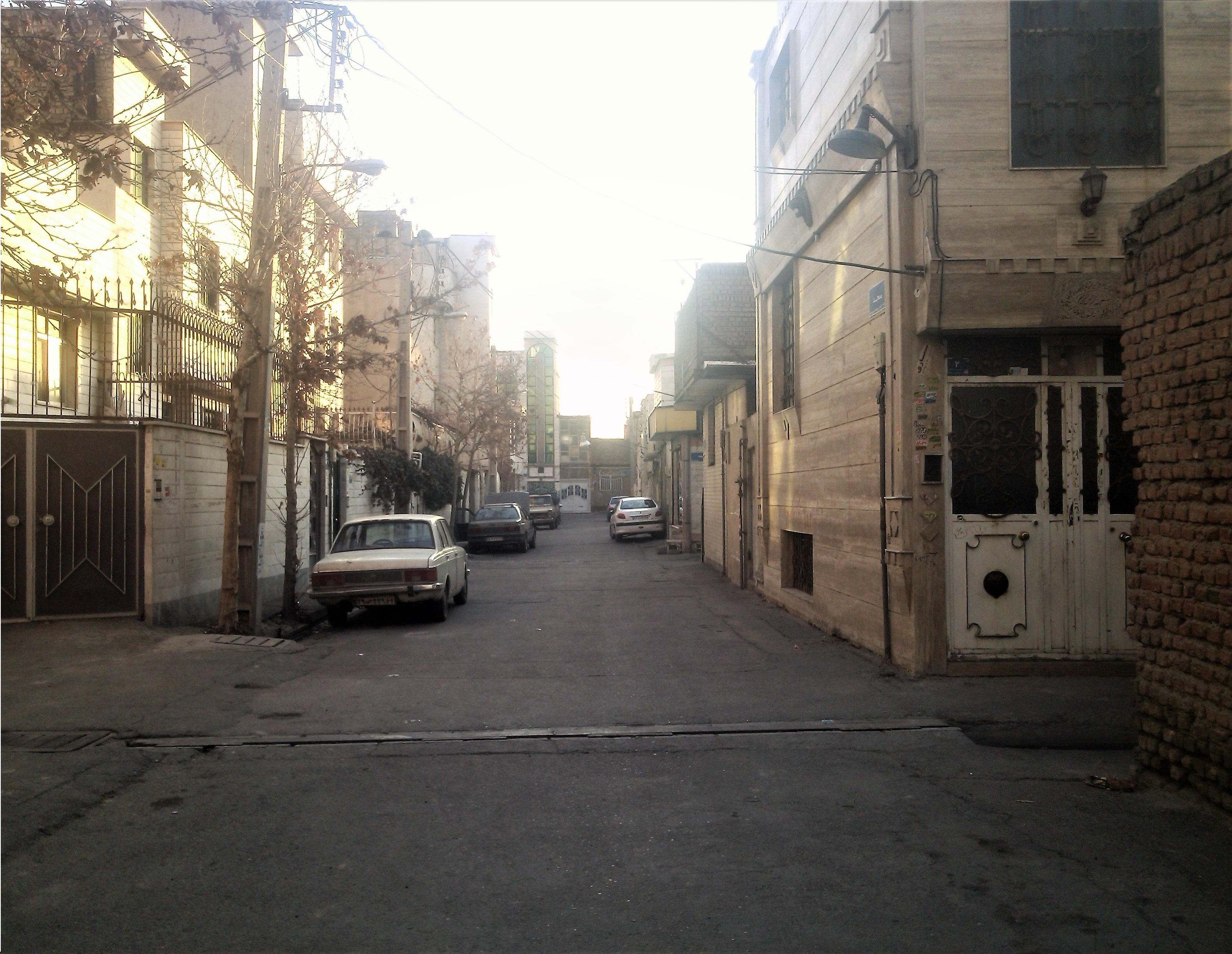 محله دولت آباد قیصریه